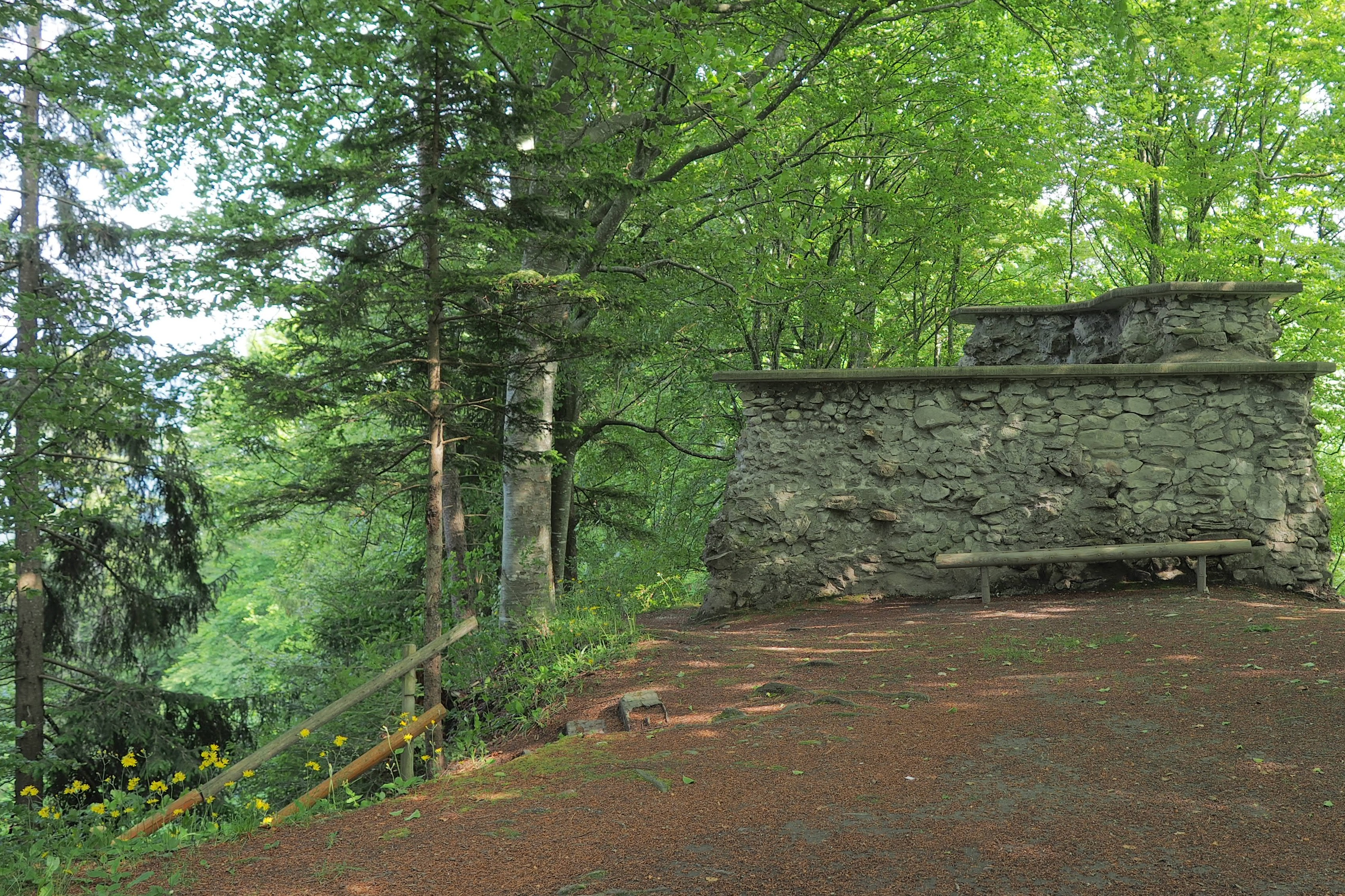 Ruine Wartenstein - Platz auf der Anhöhe